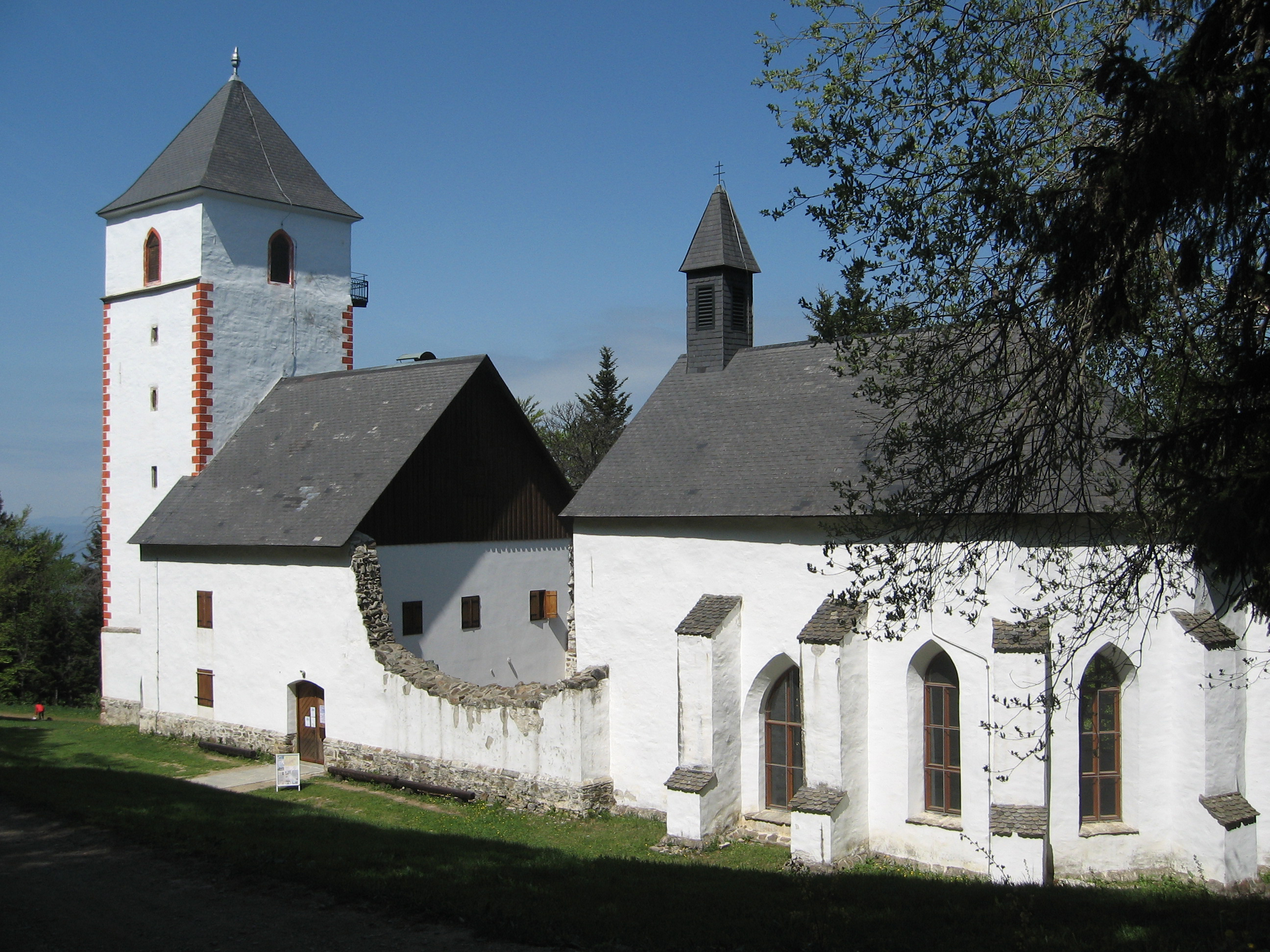 Cerkev Bolfenk Pohorje